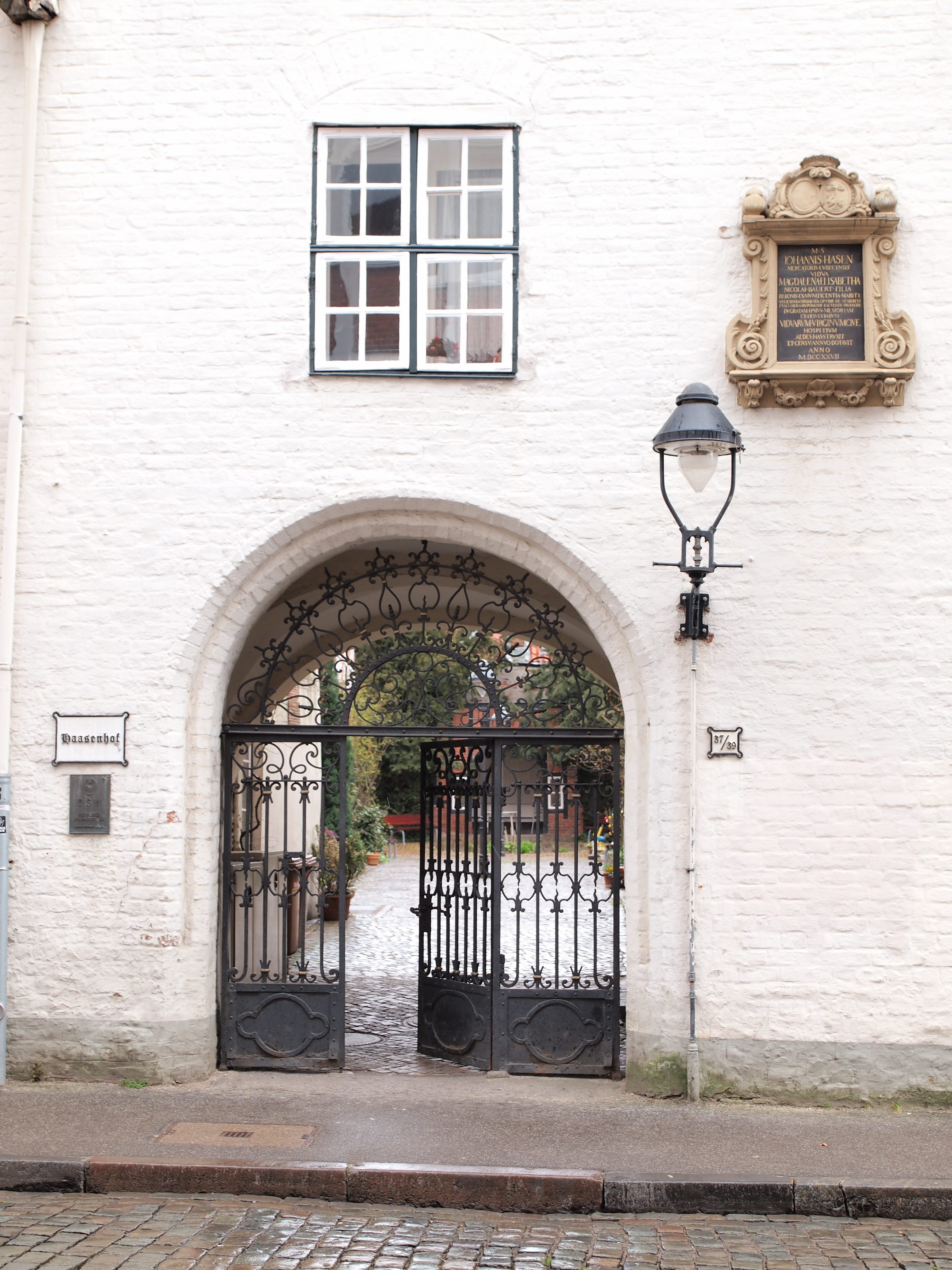 Eingang zum Haasenhof in Lübeck, Dr.-Julius-Leber-Str. 37/39